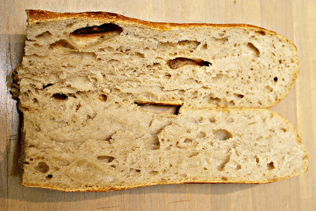 Pain paillasse de Lodève tranché